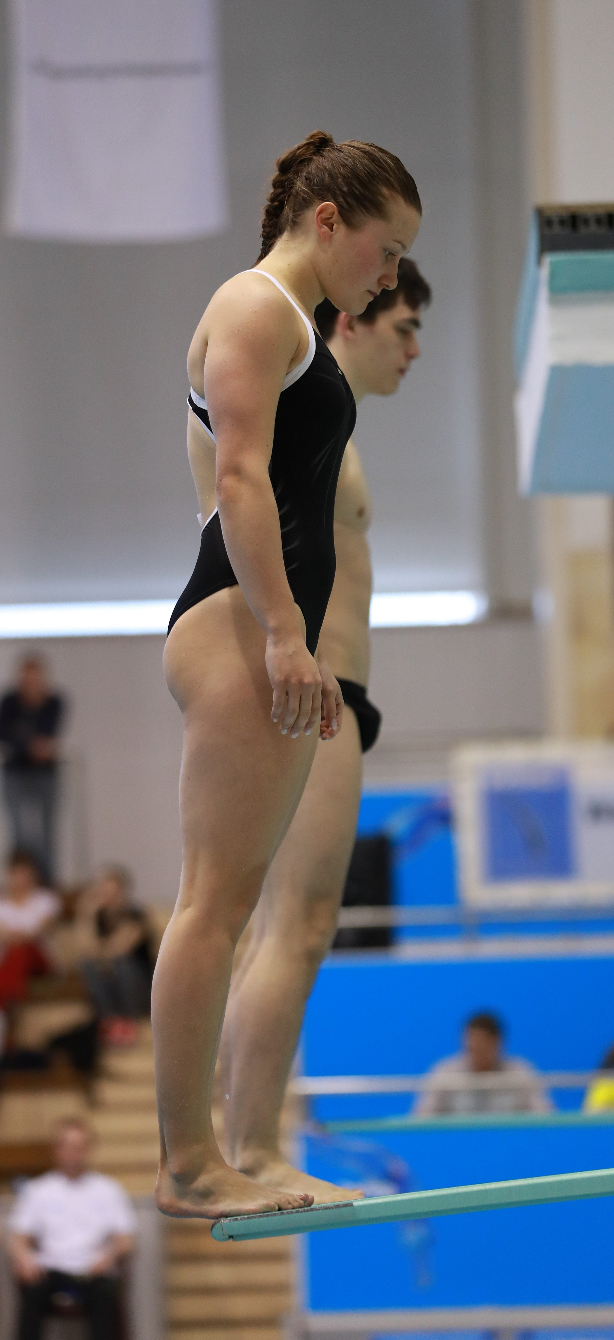 3m mixed Synchron Finale Sprung 1 bei den Internationalen Deutschen Hallenmeisterschaften im Wasserspringen Offene Klassen und Junioren. Abgebildet: Tina Punzel. Lou Massenberg.